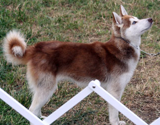 A juvenile red colored alaskan klee kai